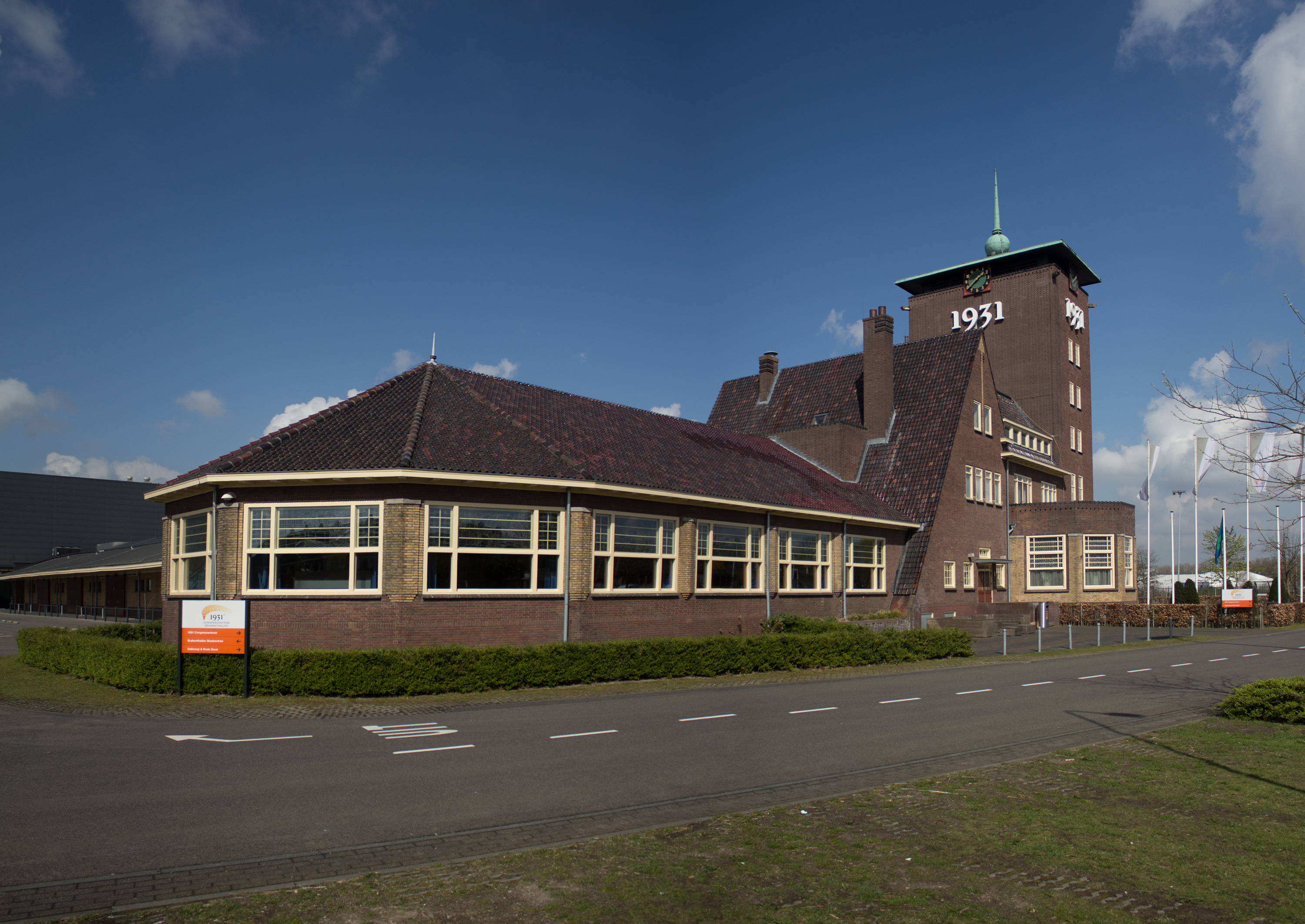 Congrescentrum Brabanthallen, gebouw 1931, Den Bosch.